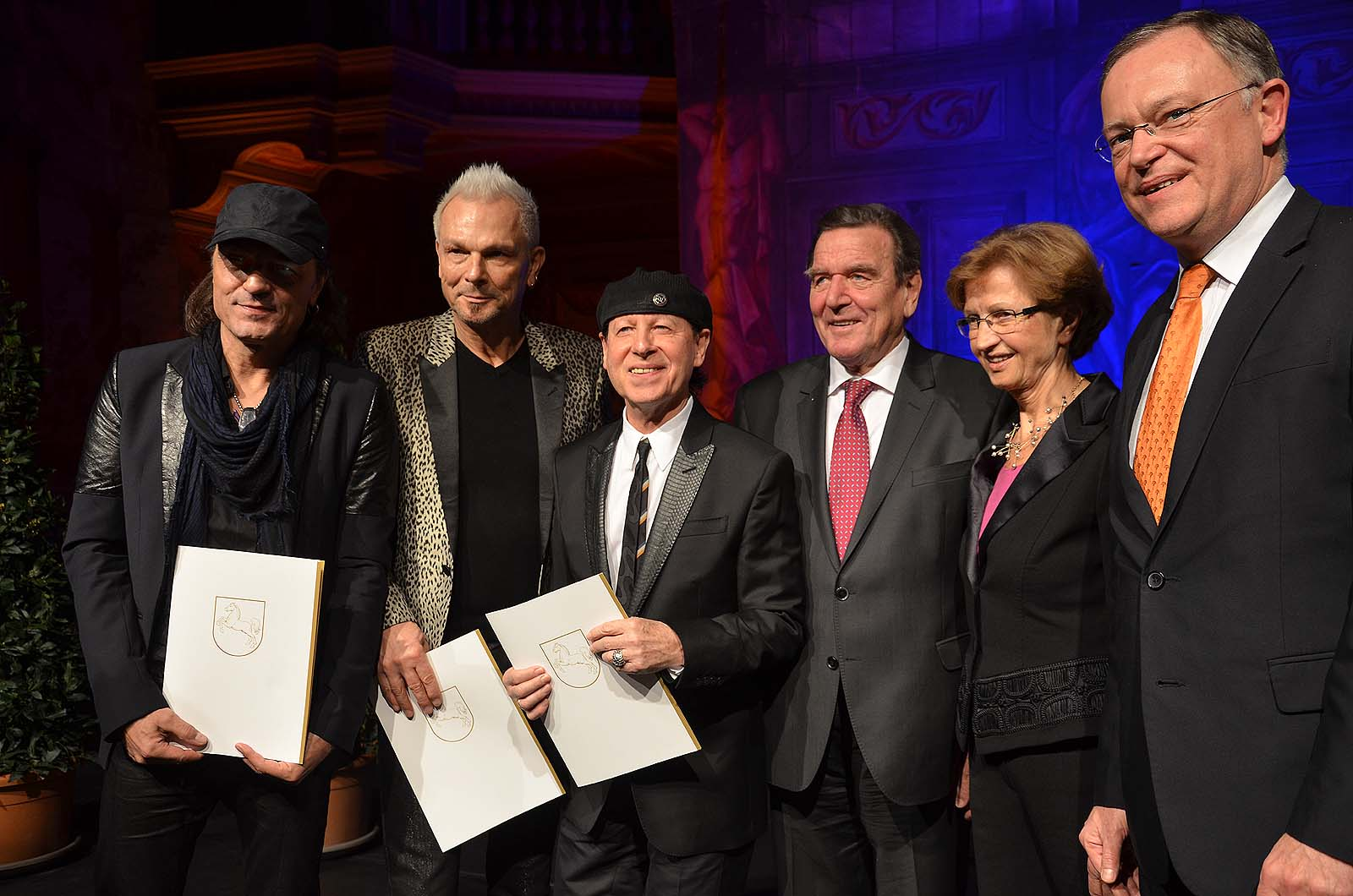 Nach der Verleihung des Niedersächsischen Staatspreises 2014 am 3. Februar 2015 im Galeriegebäude des Großen Gartens in Hannover-Herrenhausen stellten sich die so ausgezeichneten und ihre Laudatoren den angereisten Fotografen (von links): Die Scorpions-Musiker Matthias Jabs, Rudolf Schenker und Klaus Meine, Bundeskanzler a.D. Gerhard Schröder, die Chorleiterin und Dirigentin Gudrun Schröfel sowie der Minsterpräsident von Niedersachsen Stephan Weil ...